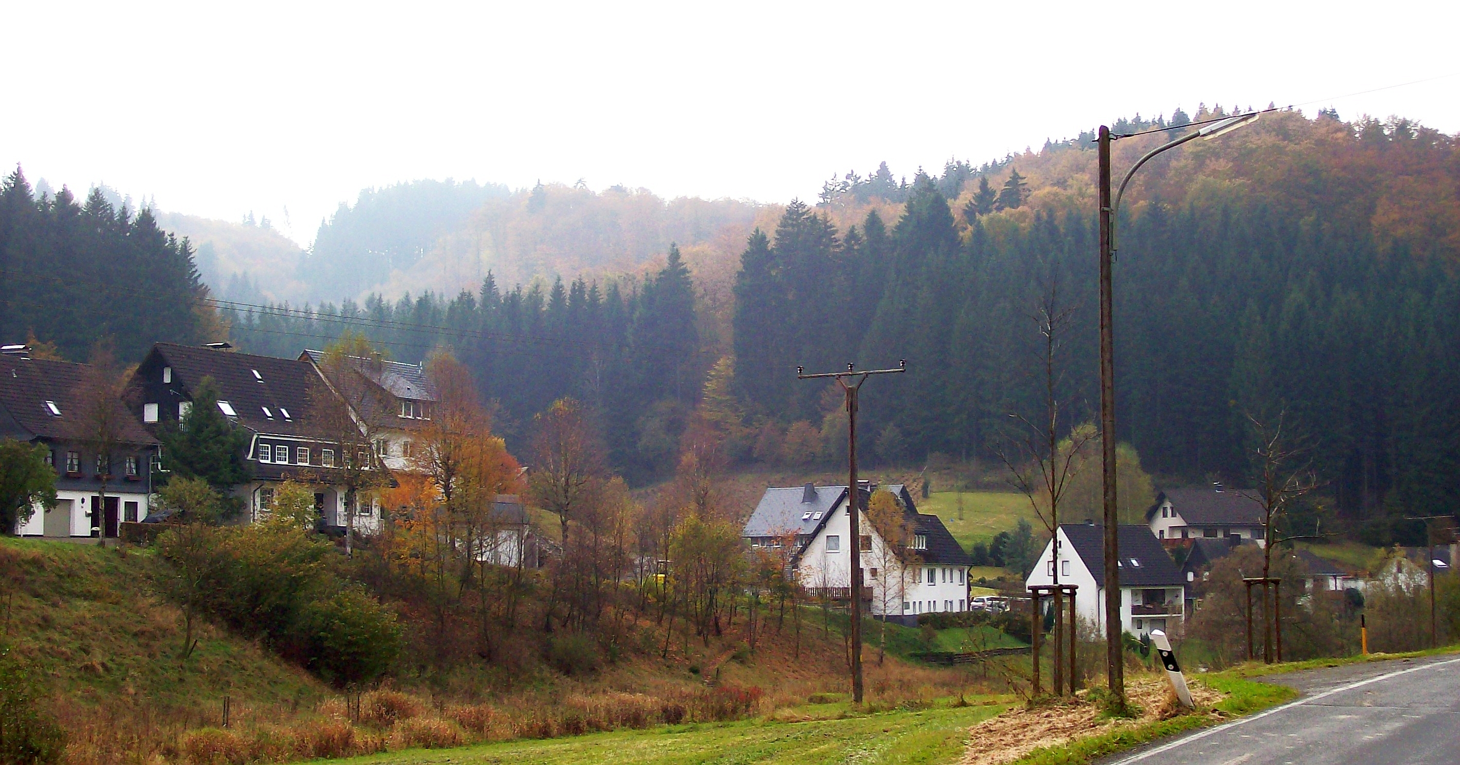 Schmallenberg-Rehsiepen (Germany)